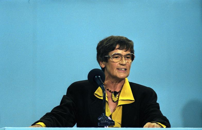 11.-13.9.1989 37. Bundesparteitag der CDU in der Bremer Stadthalle